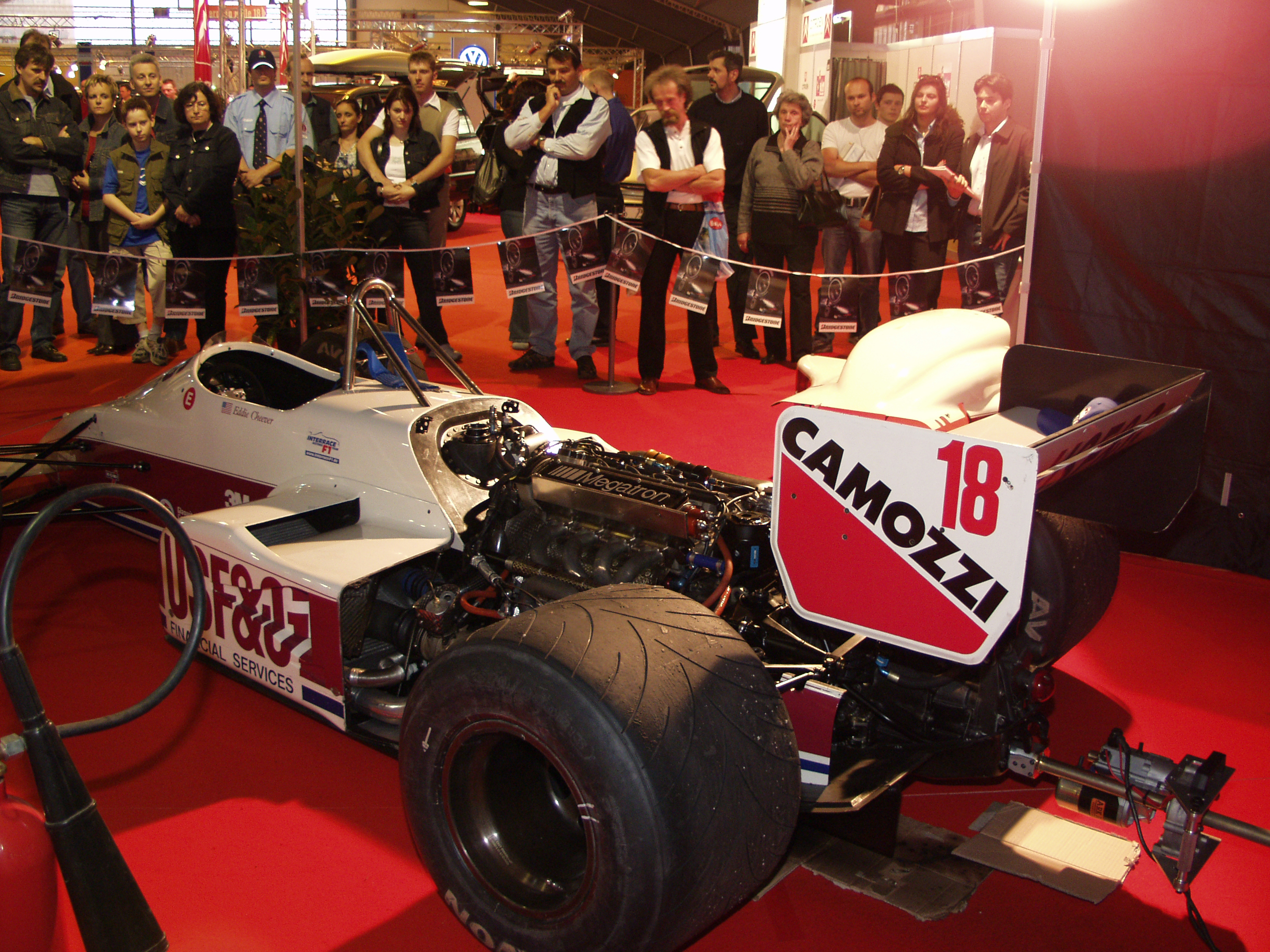 Arrows A10B im Einsatz